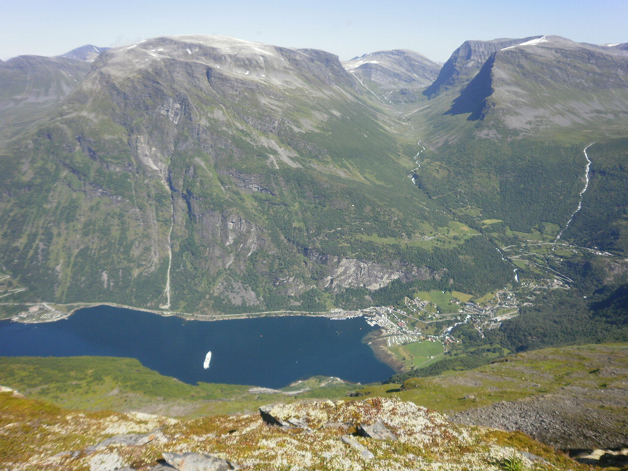 Fjell i Noreg